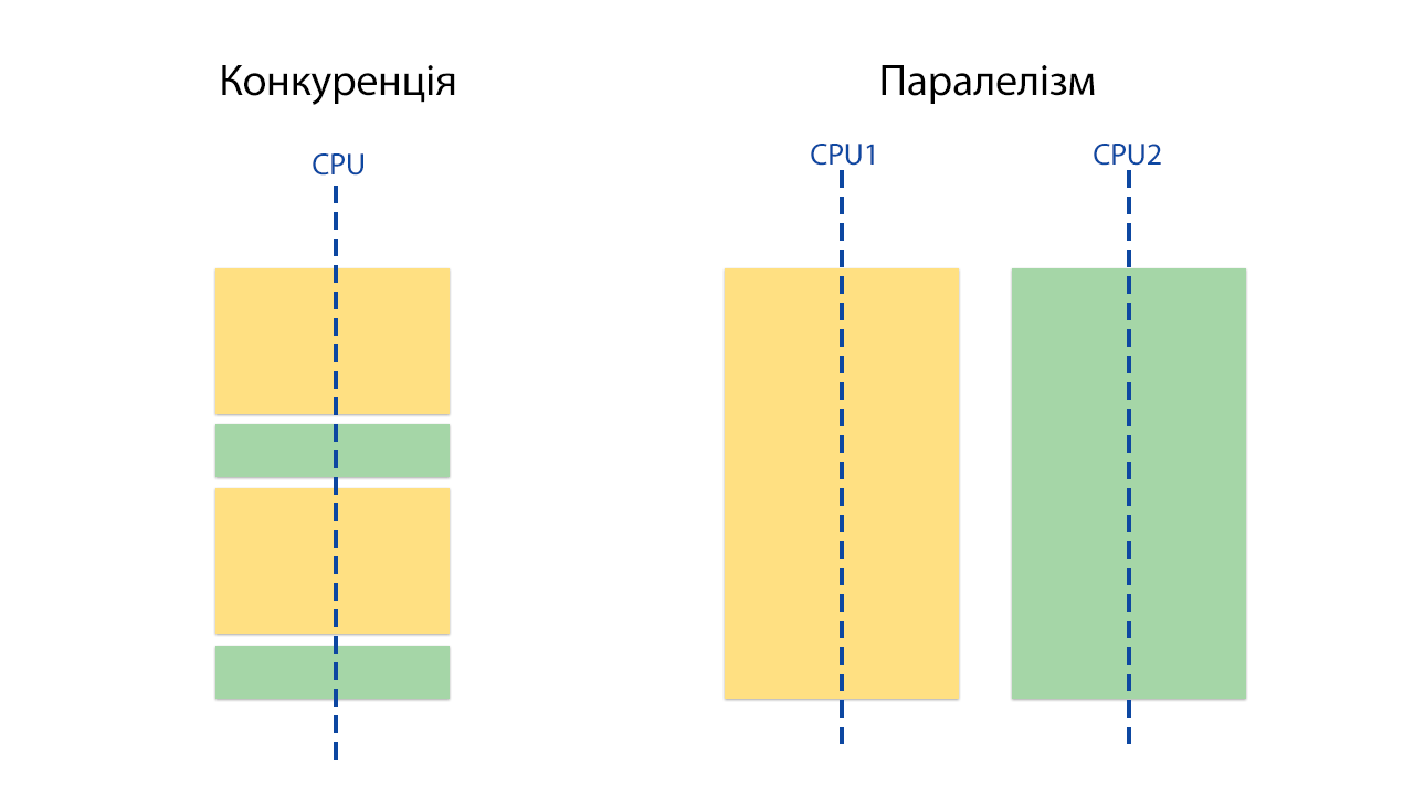 Приклад роботи конкуренції та паралелізму